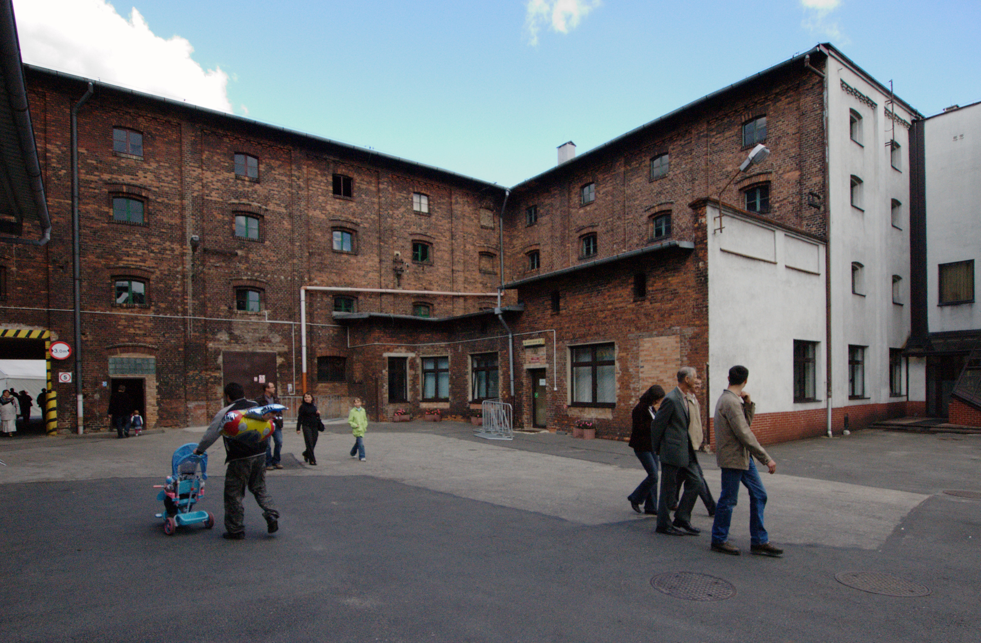 Browary Górnośląskie w Zabrzu. Jeden z przedwojennych budynków.